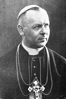 Biskup Walenty Dymek